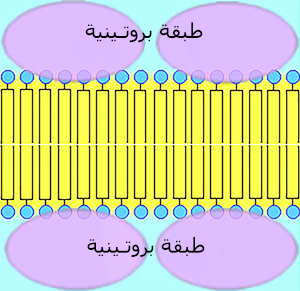 مخطط طبقة ثنائية من الدهون مع البروتينات الطرفية.